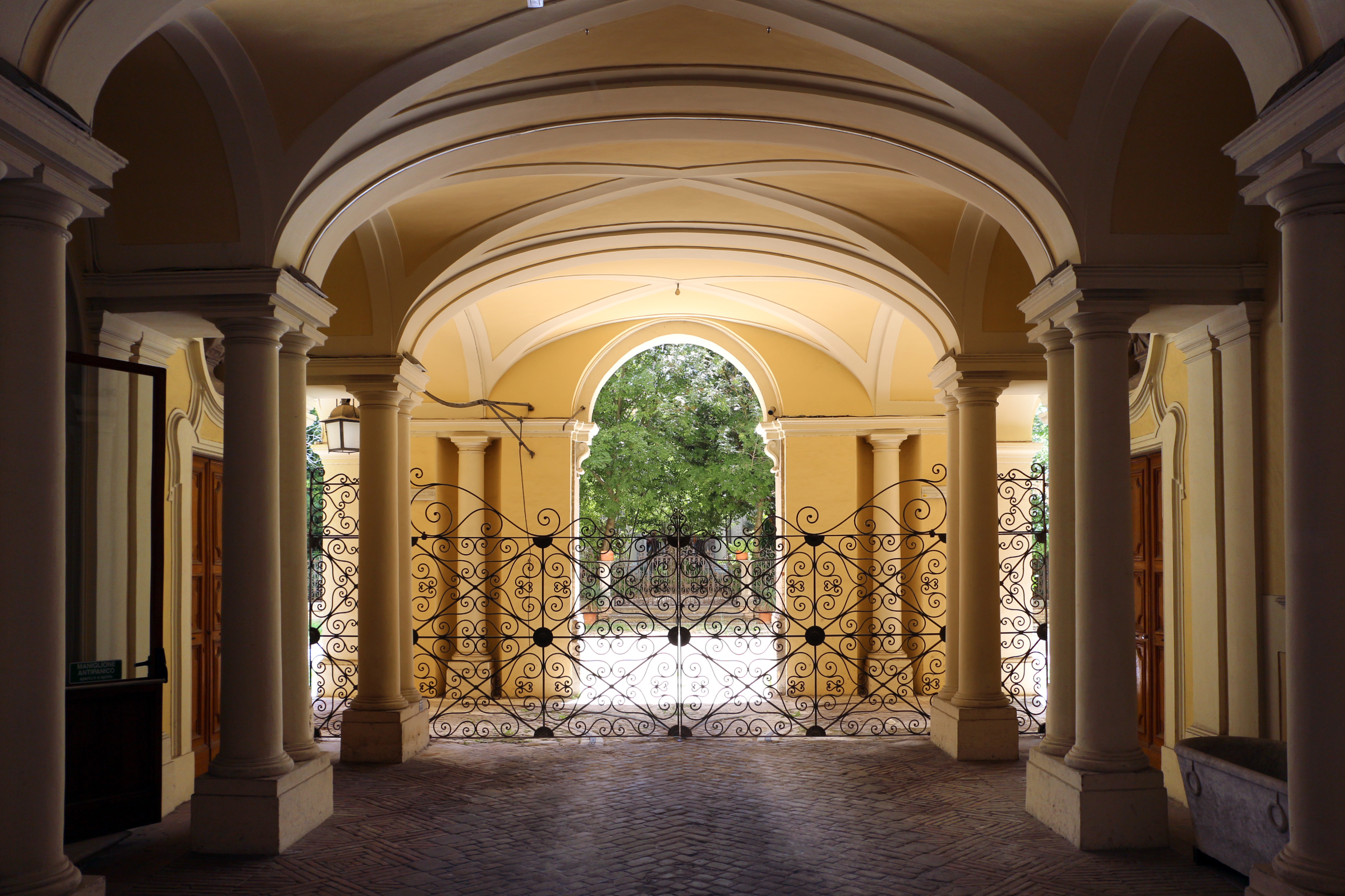 Pinacoteca Civica, Palazzo Pianetti This is a photo of a monument which is part of cultural heritage of Italy.